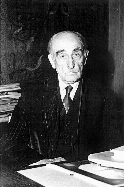 Profesor Mieczysław Gębarowicz.